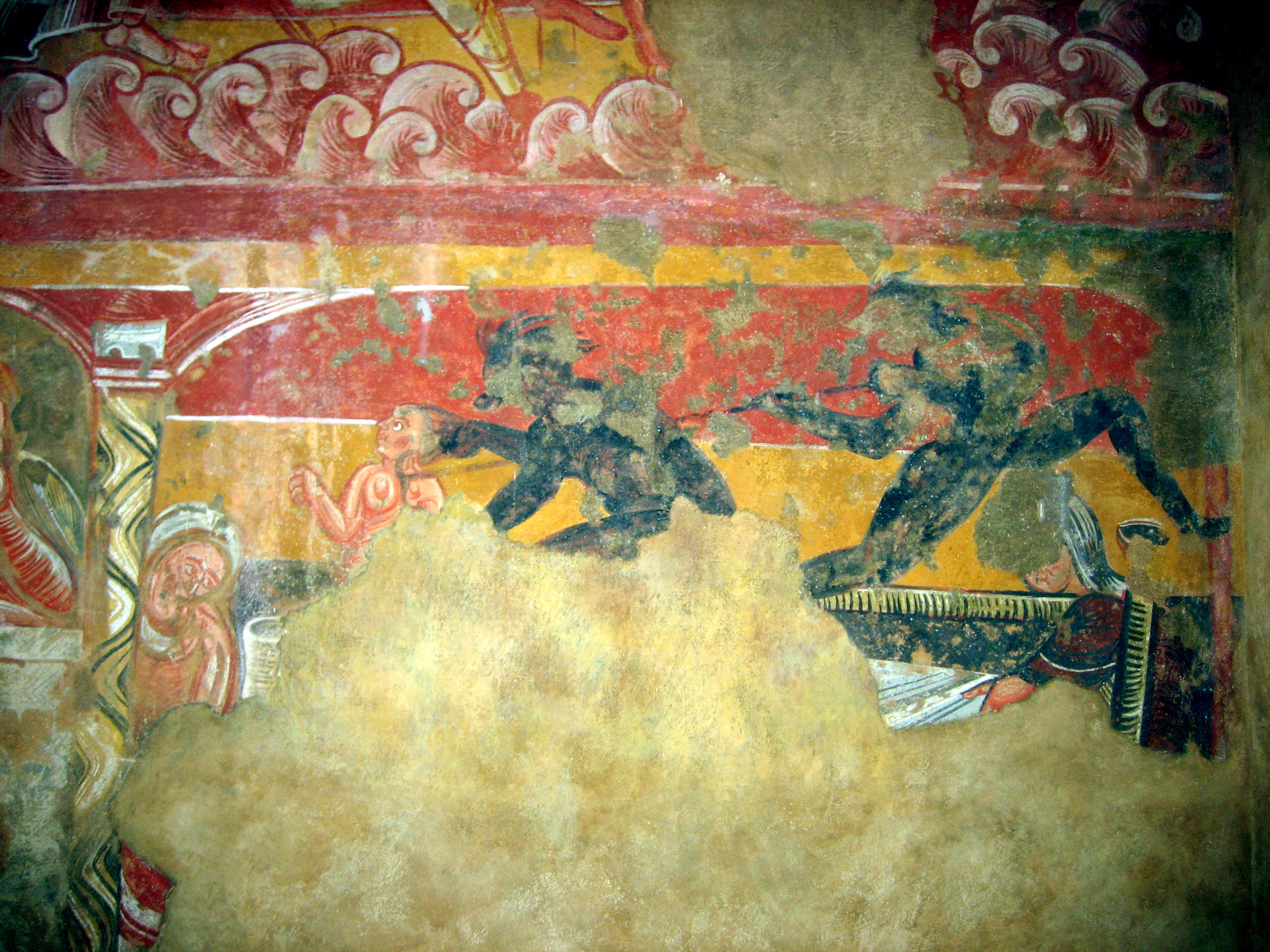 L'âme du mauvais riche, sous la forme d'un petit personnage, est enlevée par deux démons noirs